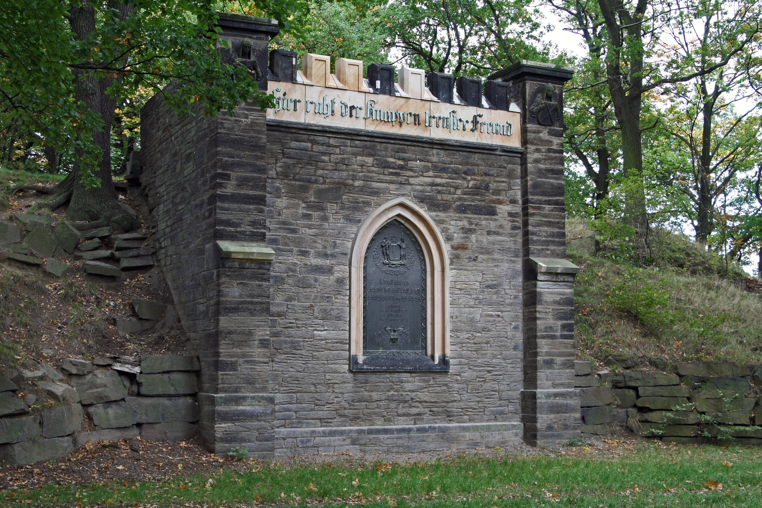 Herders Ruhe, Herder's grave